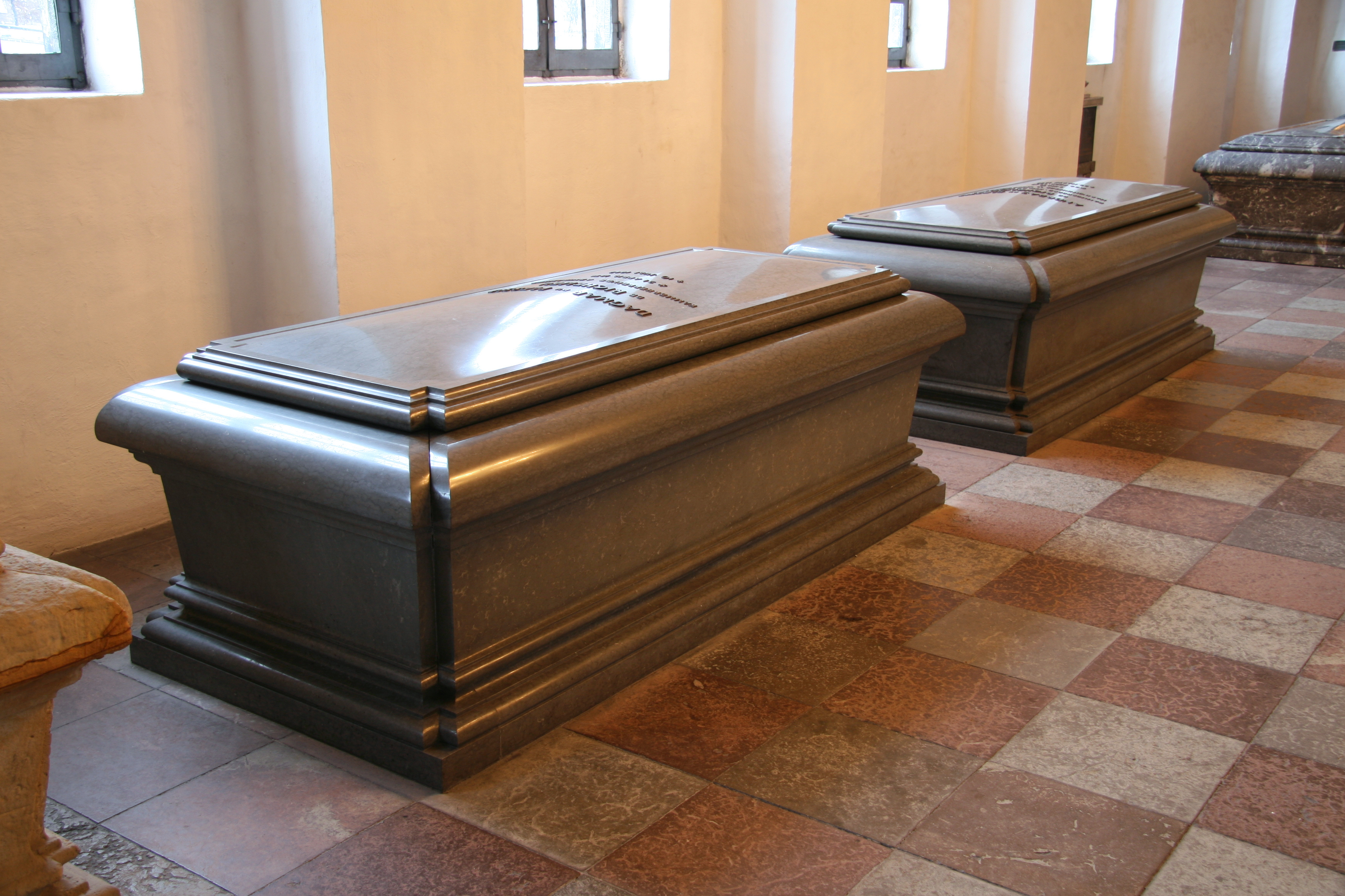 Holmens Kirke, Copenhagen, Denmark . Dagmar og Andreas du Plessis de Richelieus sarkofager i store kapel.